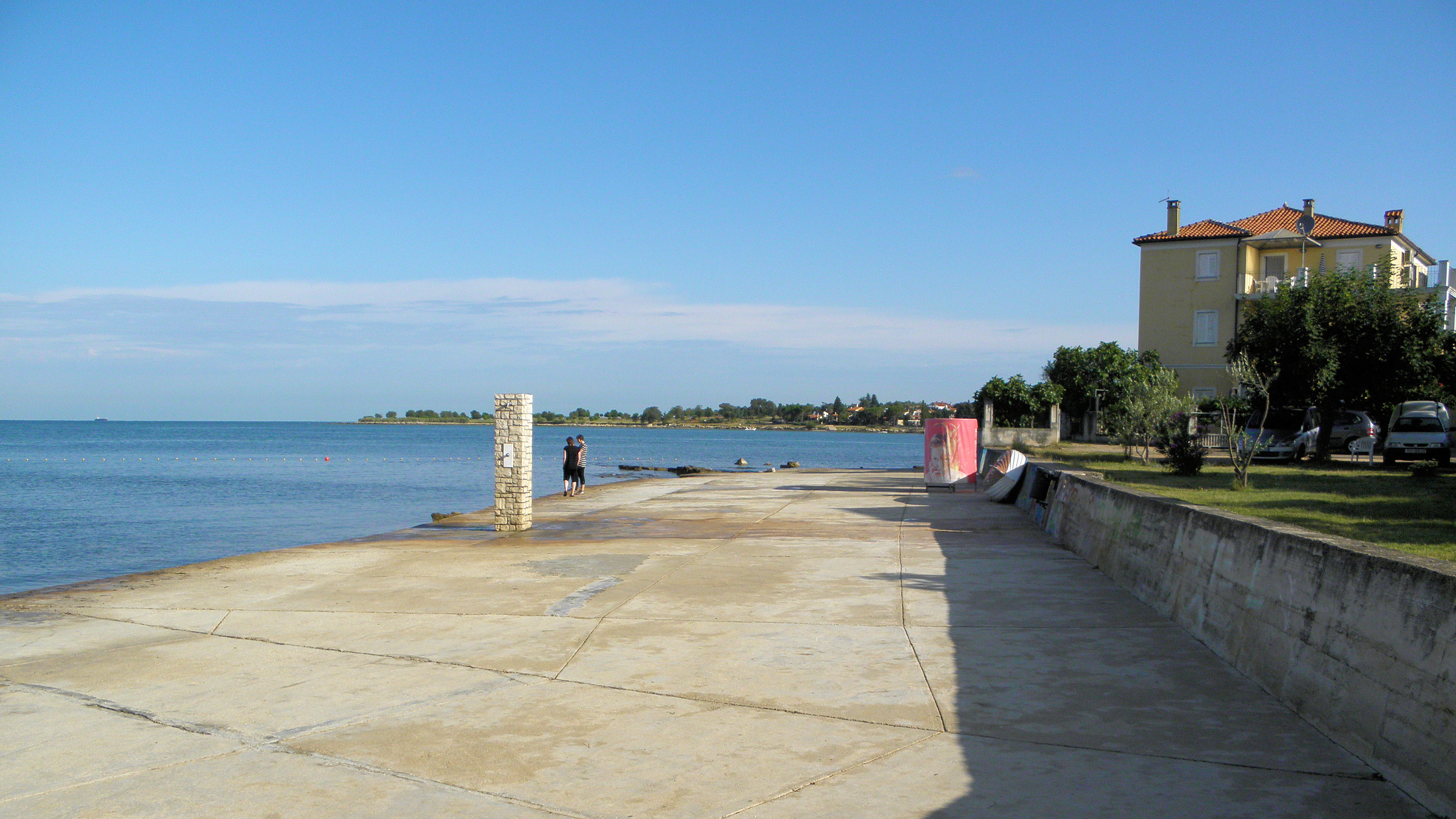 Dajla 2011_3